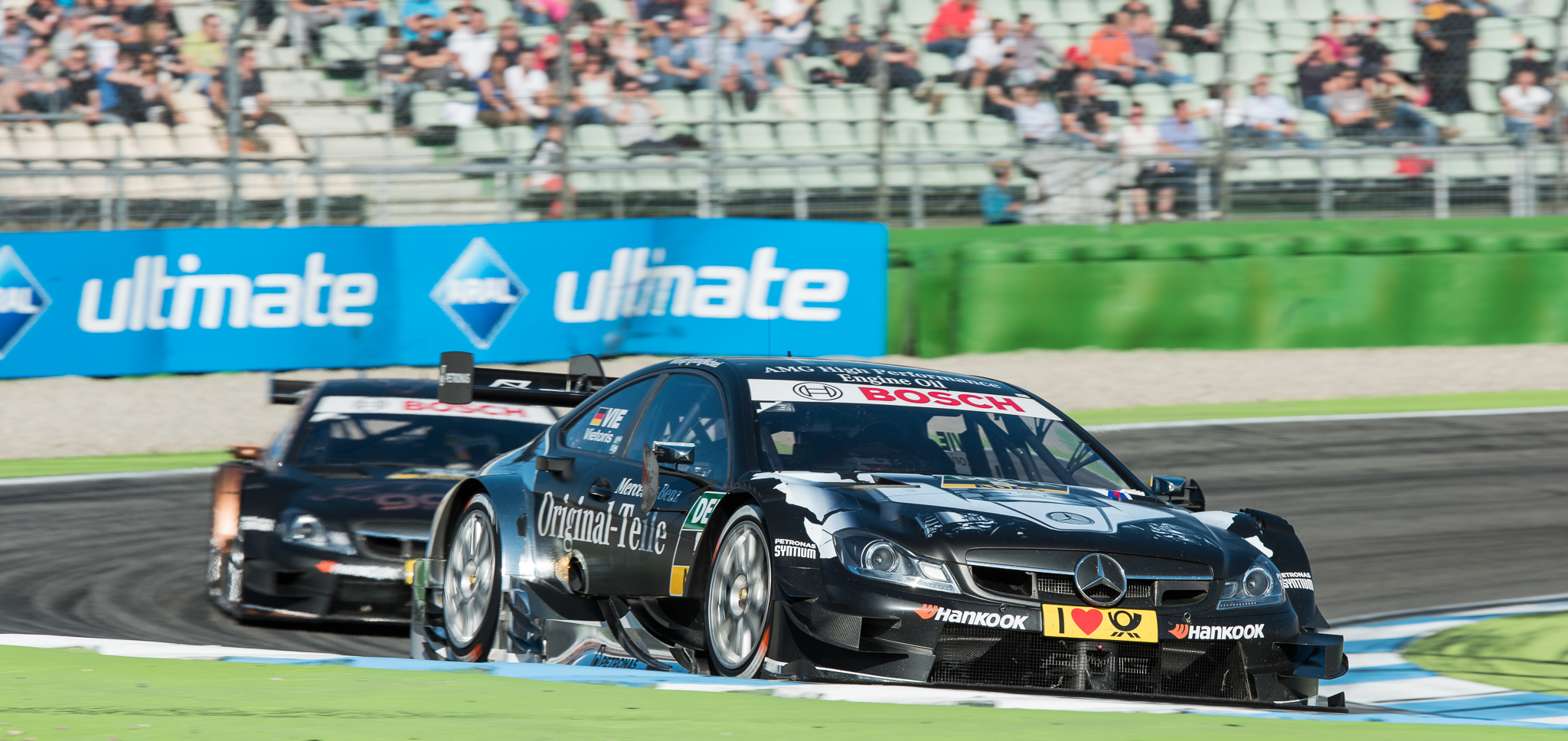 Christian Vietoris,DTM,Deutsche Tourenwagen Masters,HWA AG,Hockenheimring,Motorsport,Original-Teile Mercedes AMG C-Coupe,Pascal Wehrlein,gooix Mercedes AMG C-Coupe